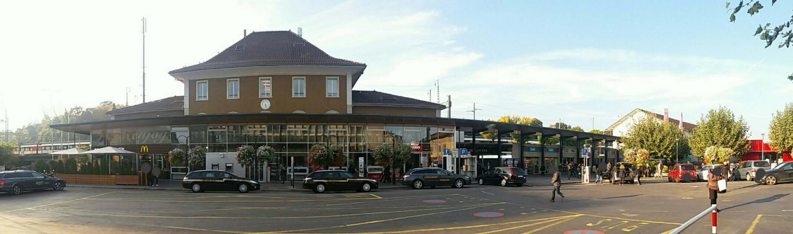 Gare de Morges vue de la place